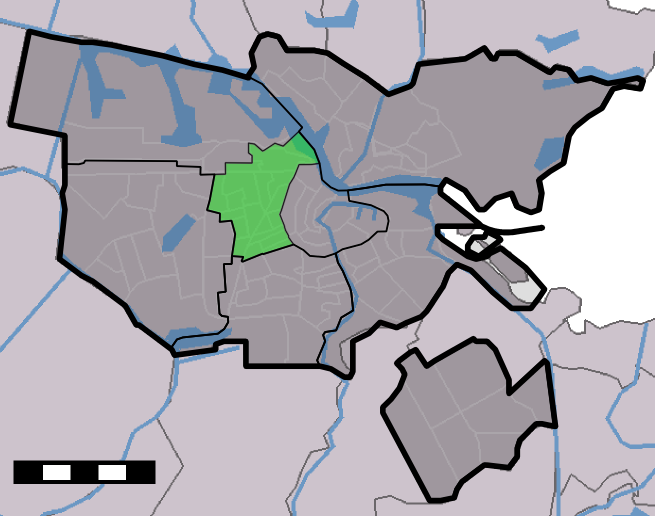 Stadsdeel West (2010)